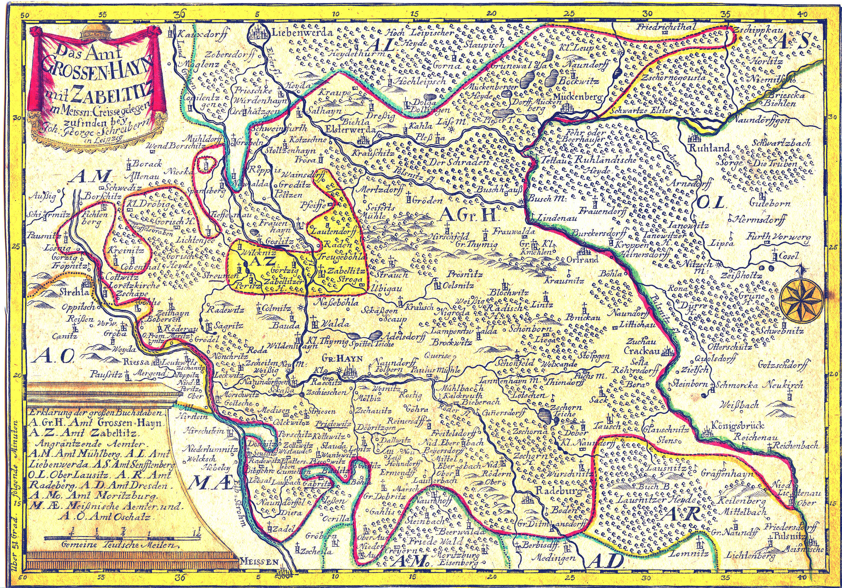 Ämter Grossen-Hayn und Zabeltitz